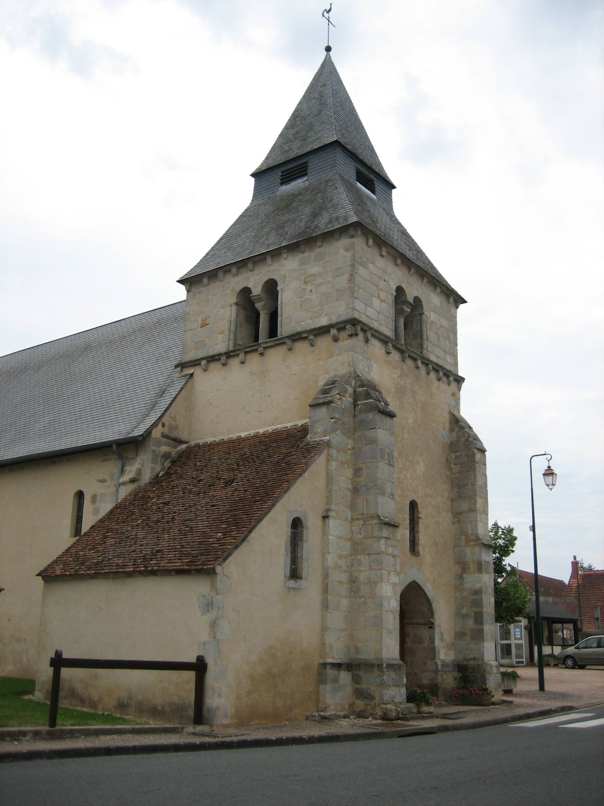 Clocher et Porche de l'église Saint-Pierre et Saint-Paul de Maisonnais